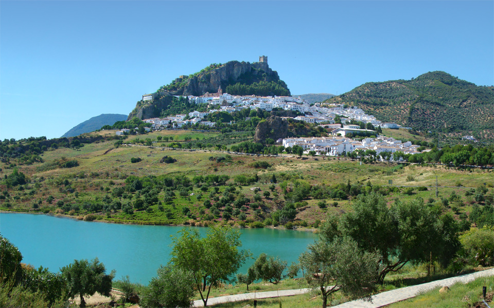 Zahara de la Sierra, Andalucía, España.